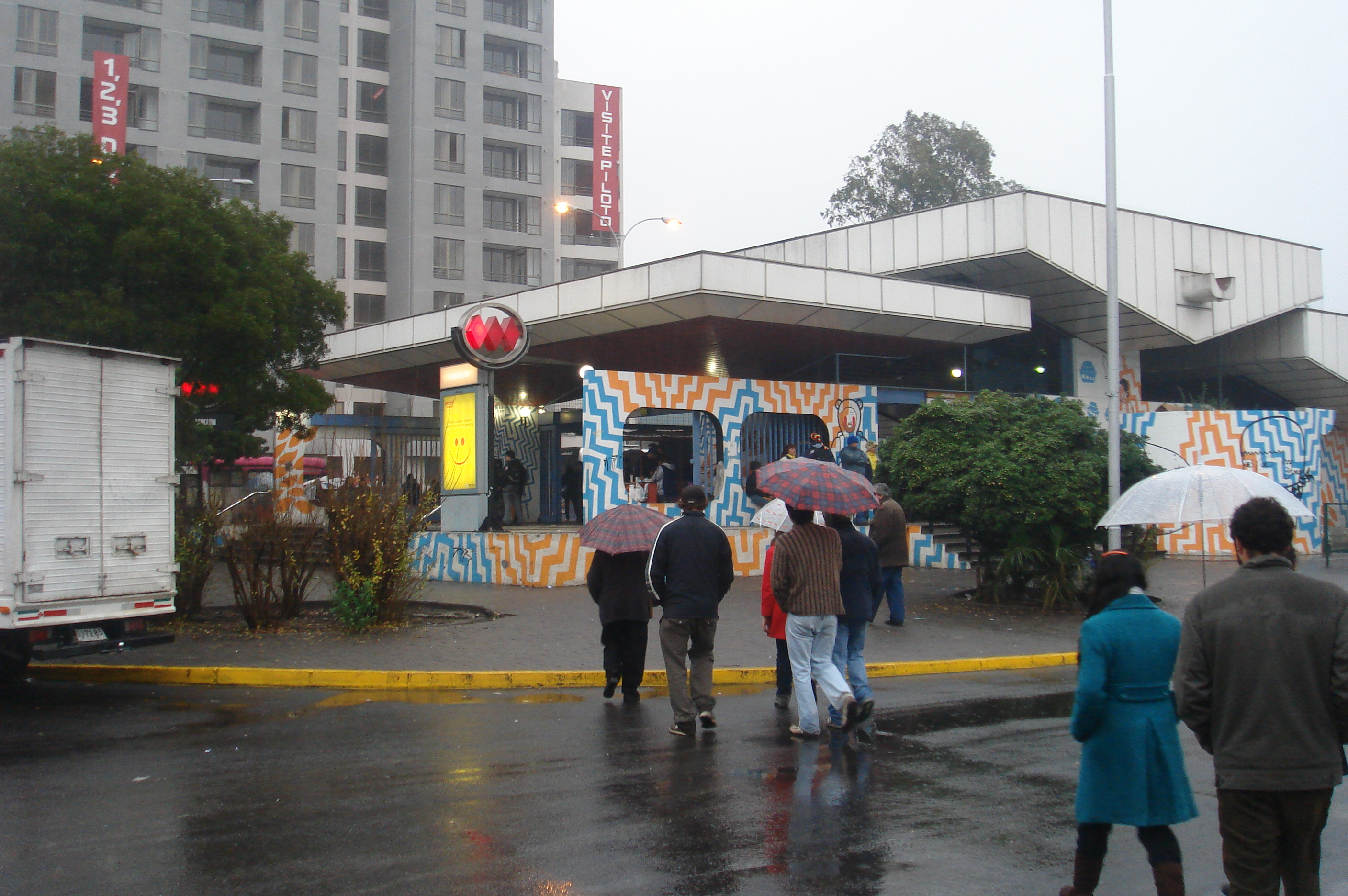 Metro Estacion Franklin / Linea 2 / Nataniel Cox con Placer